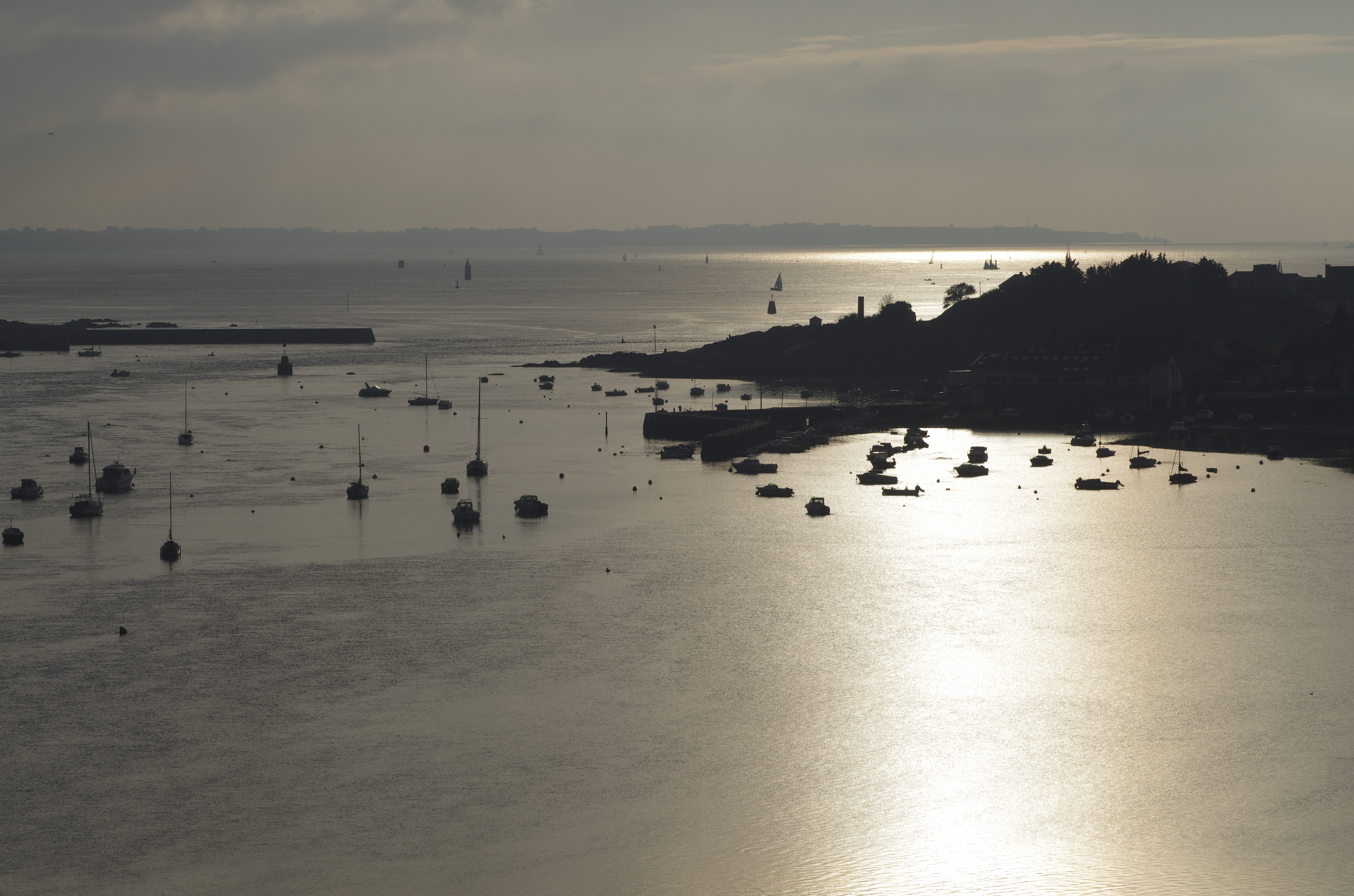 Vue du haut du phare de Kerbel sur la baie de port louis